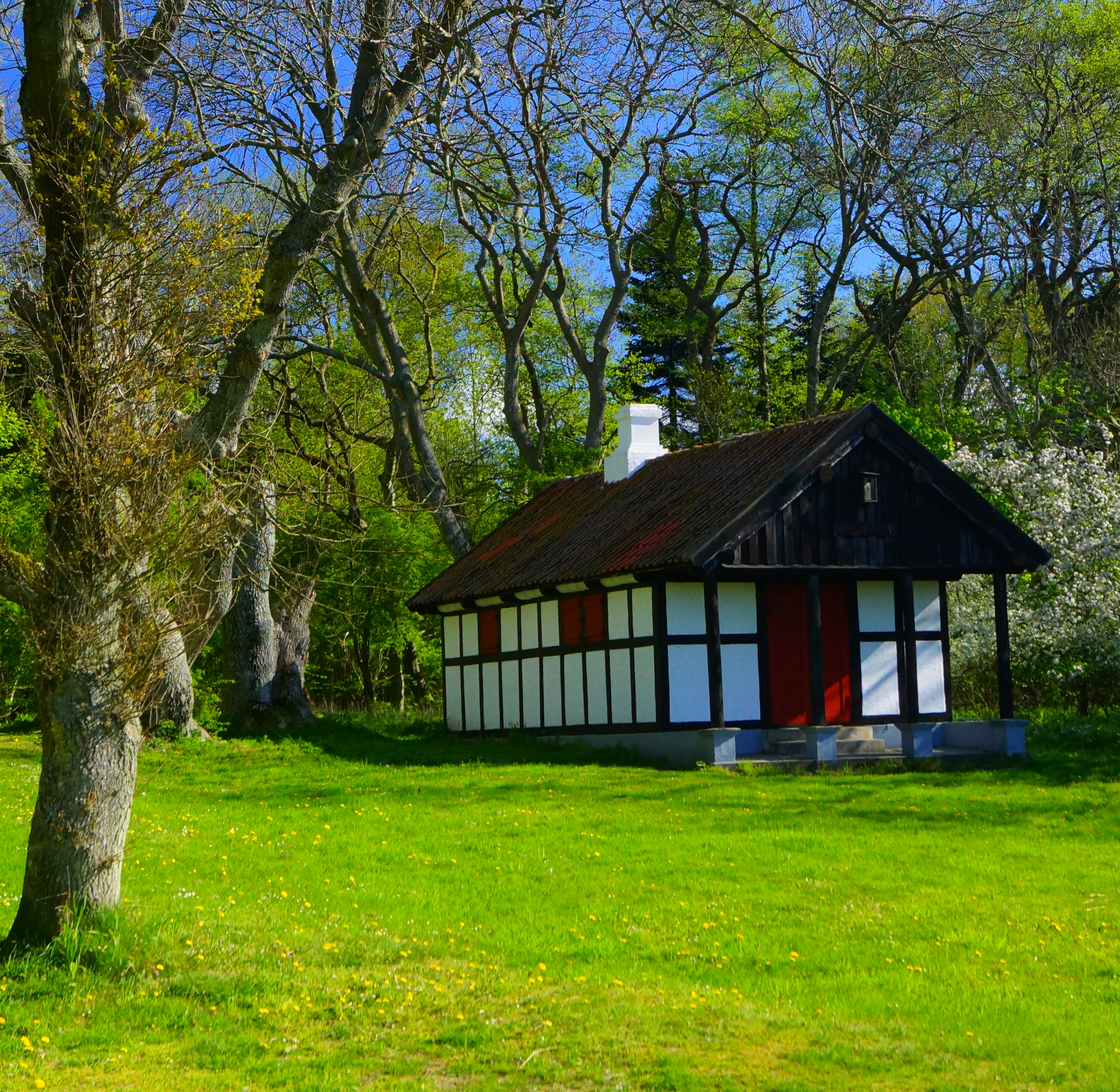 Thyras hytte, Hestehave Skov x